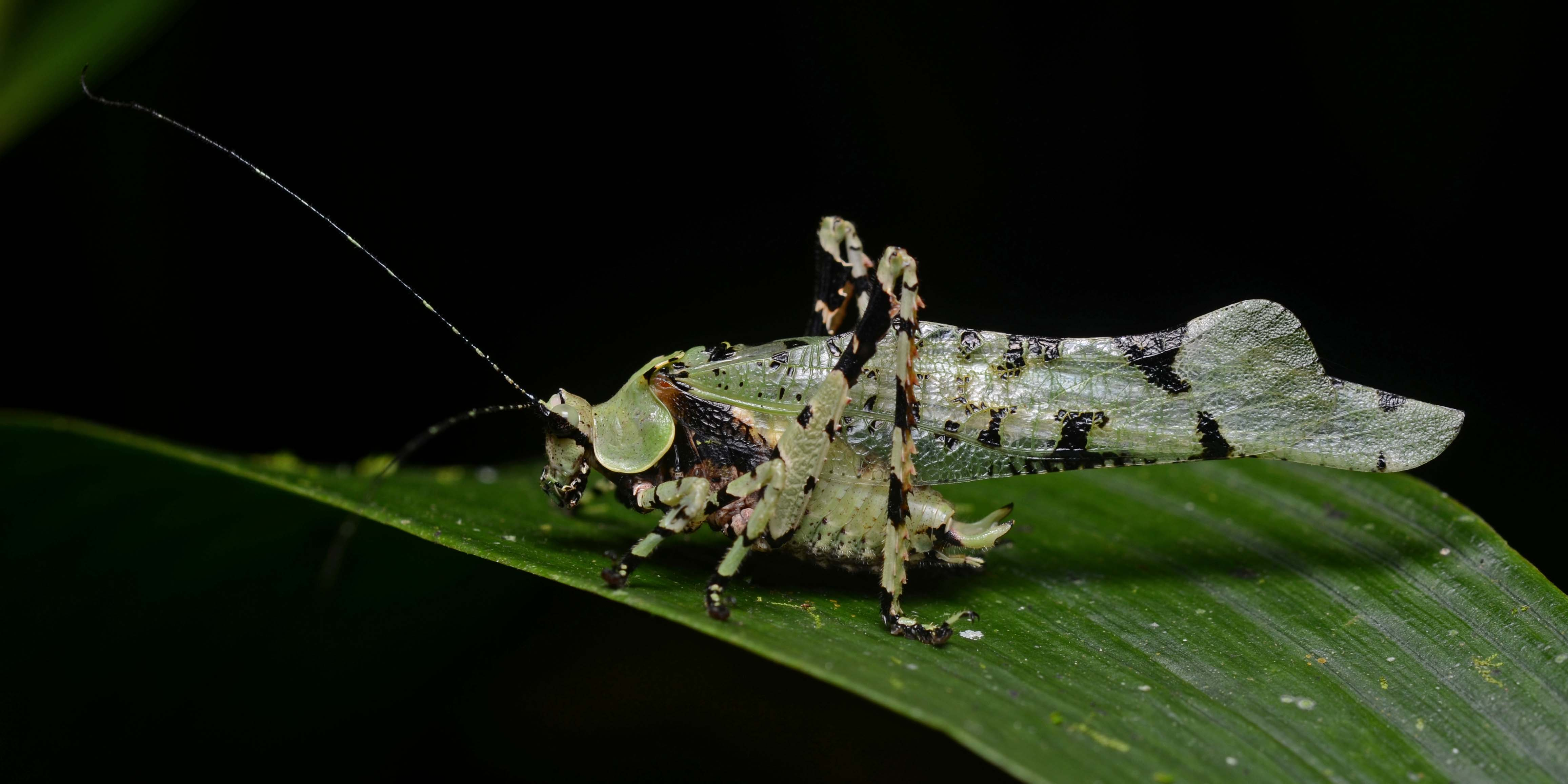 Tettigoniidae: Dysonia holgeri